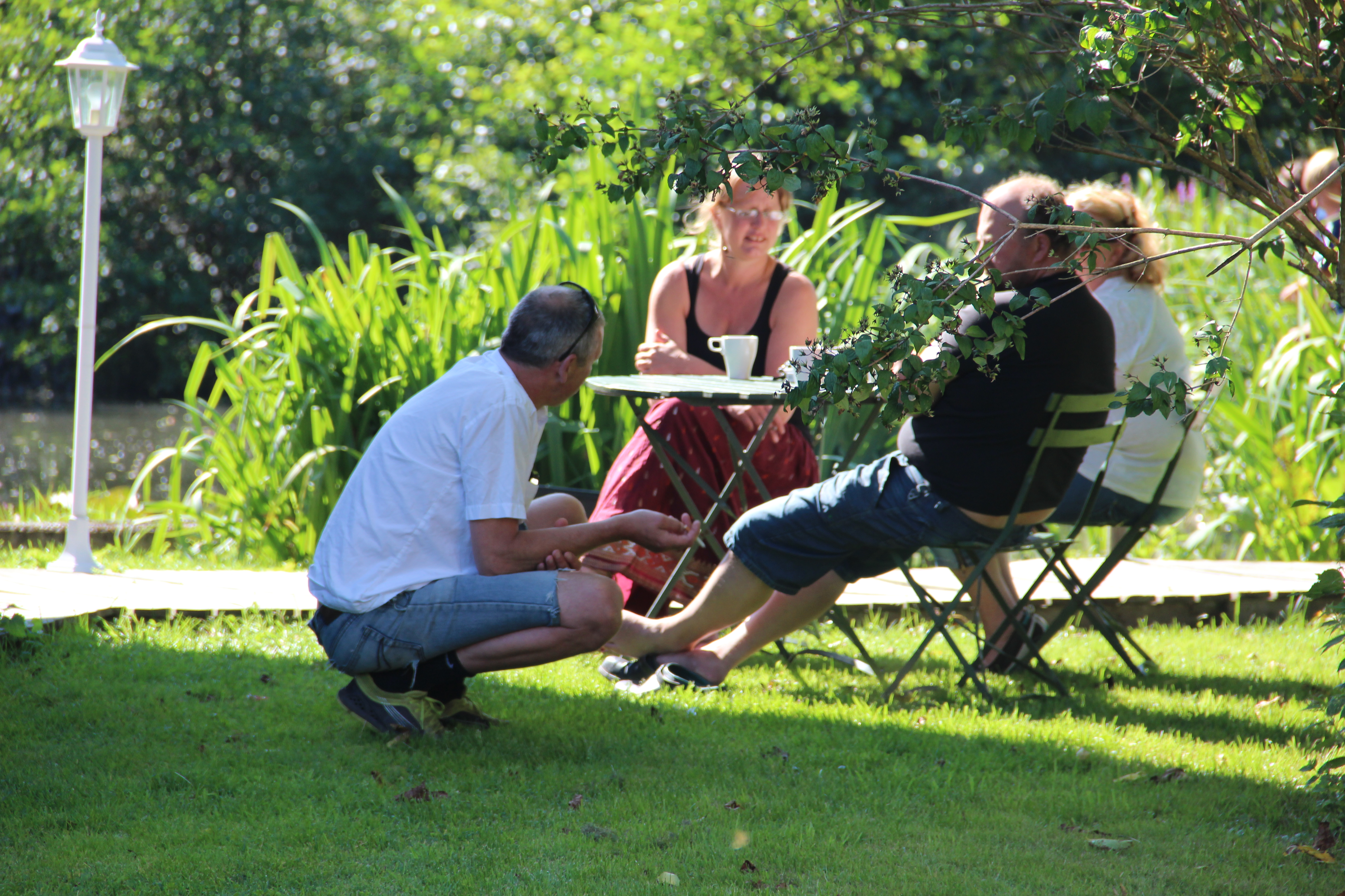 Cafe' ute